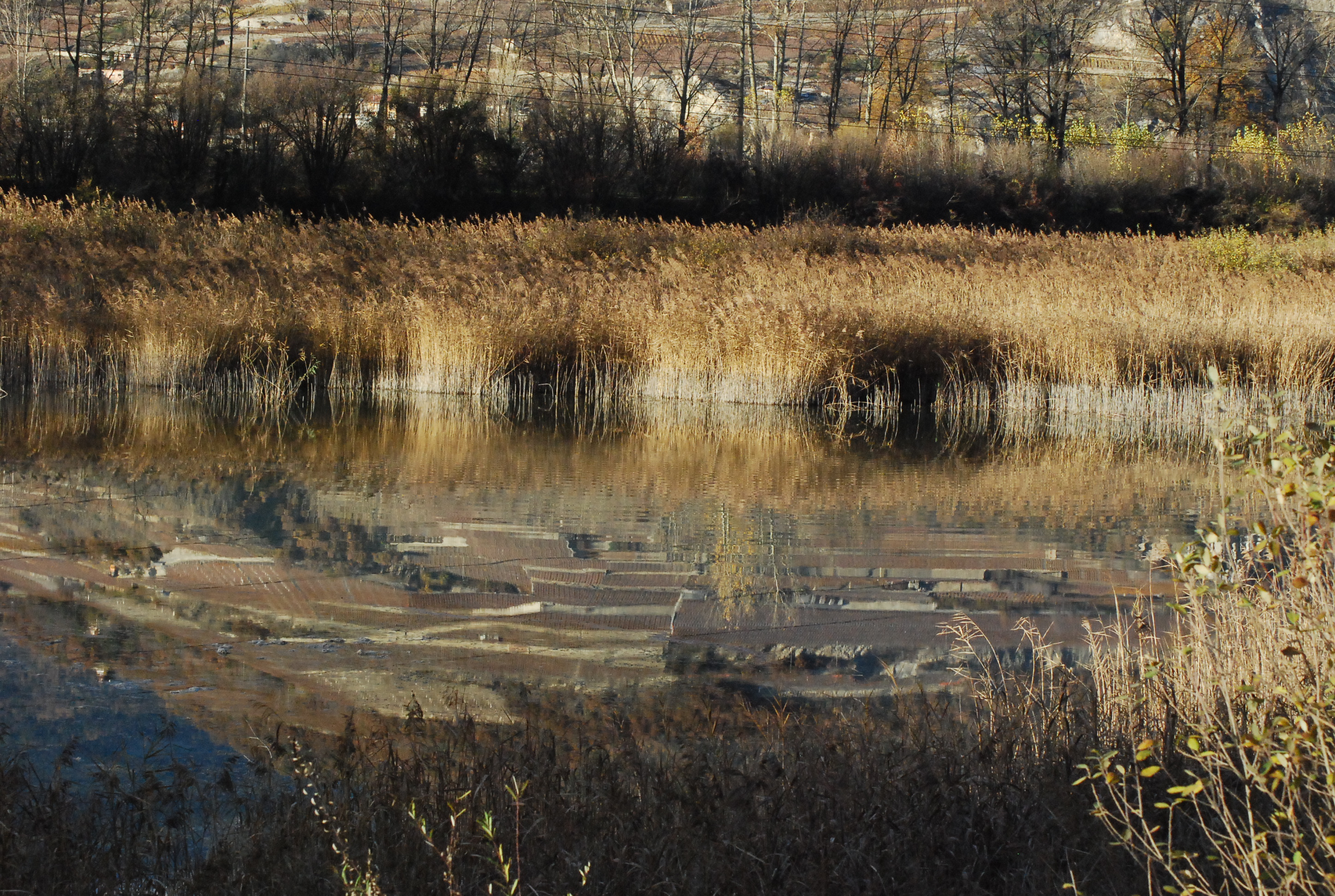 Marais de Poutafontana dans le canton du Valais, Suisse